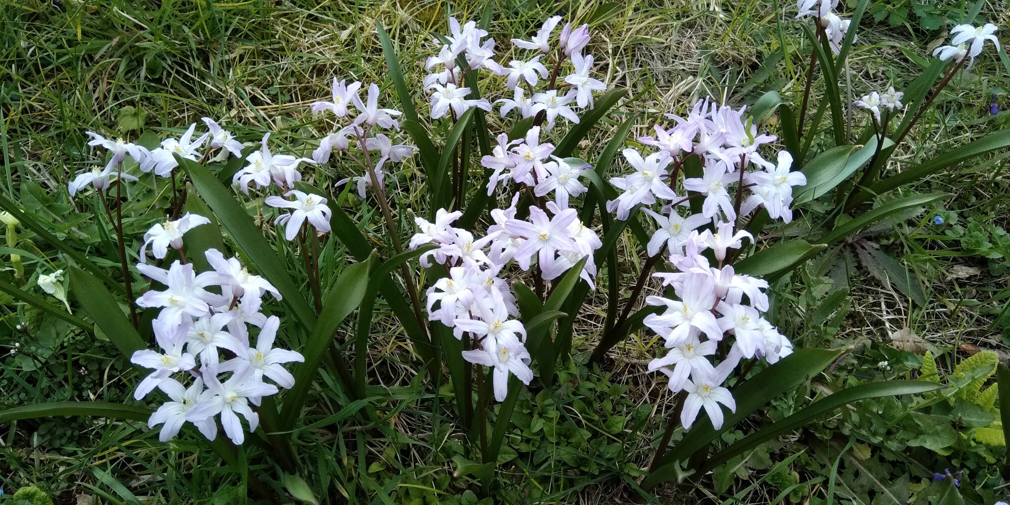 Chionodoxa (Scilla luciliae ) cultivar dans un jardin en mars dans les Yvelines.